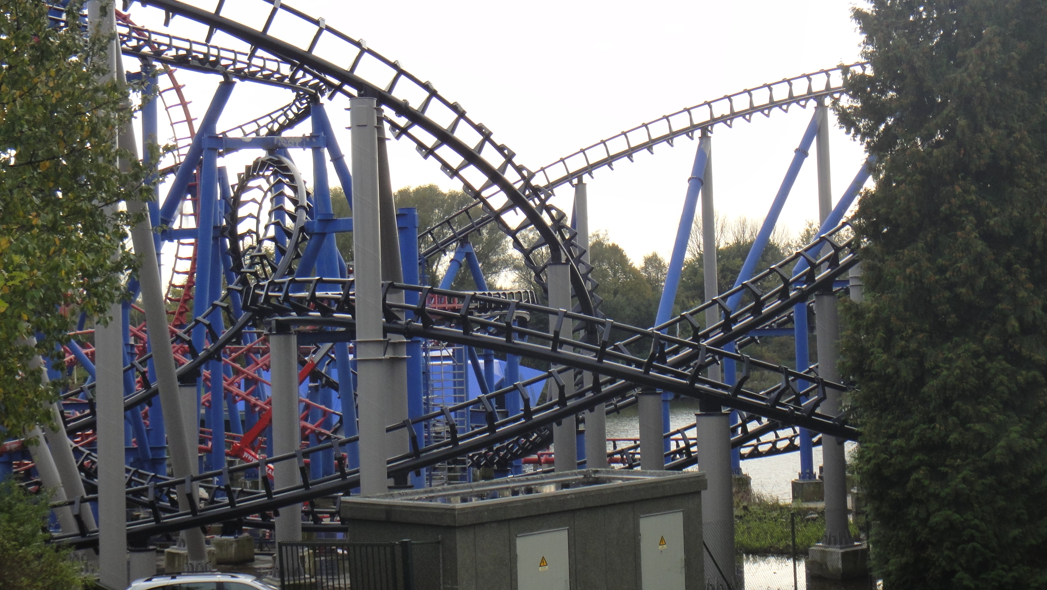 Het schilderwerk van Xpress in Walibi Holland